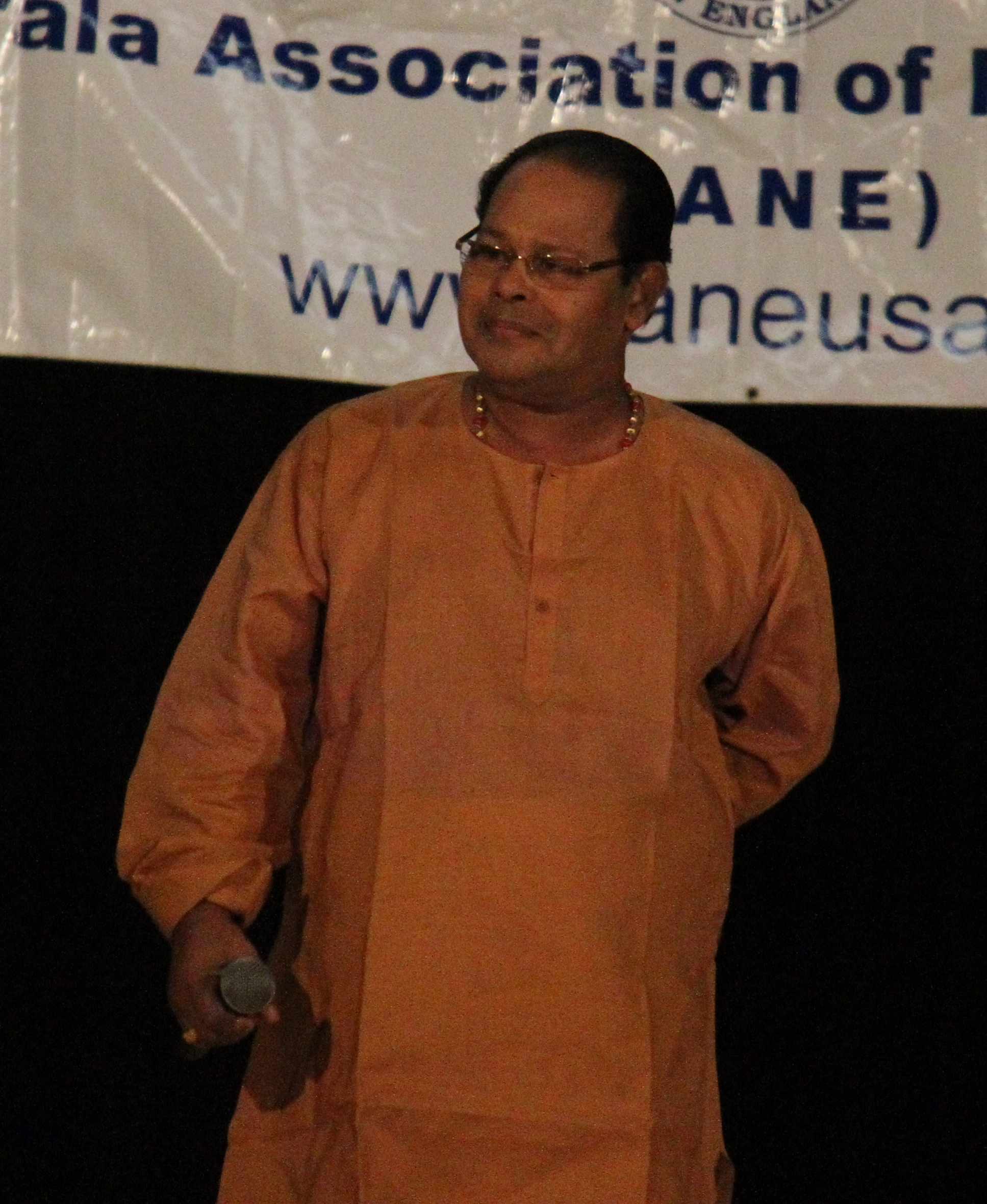 Innocent malayalam artist